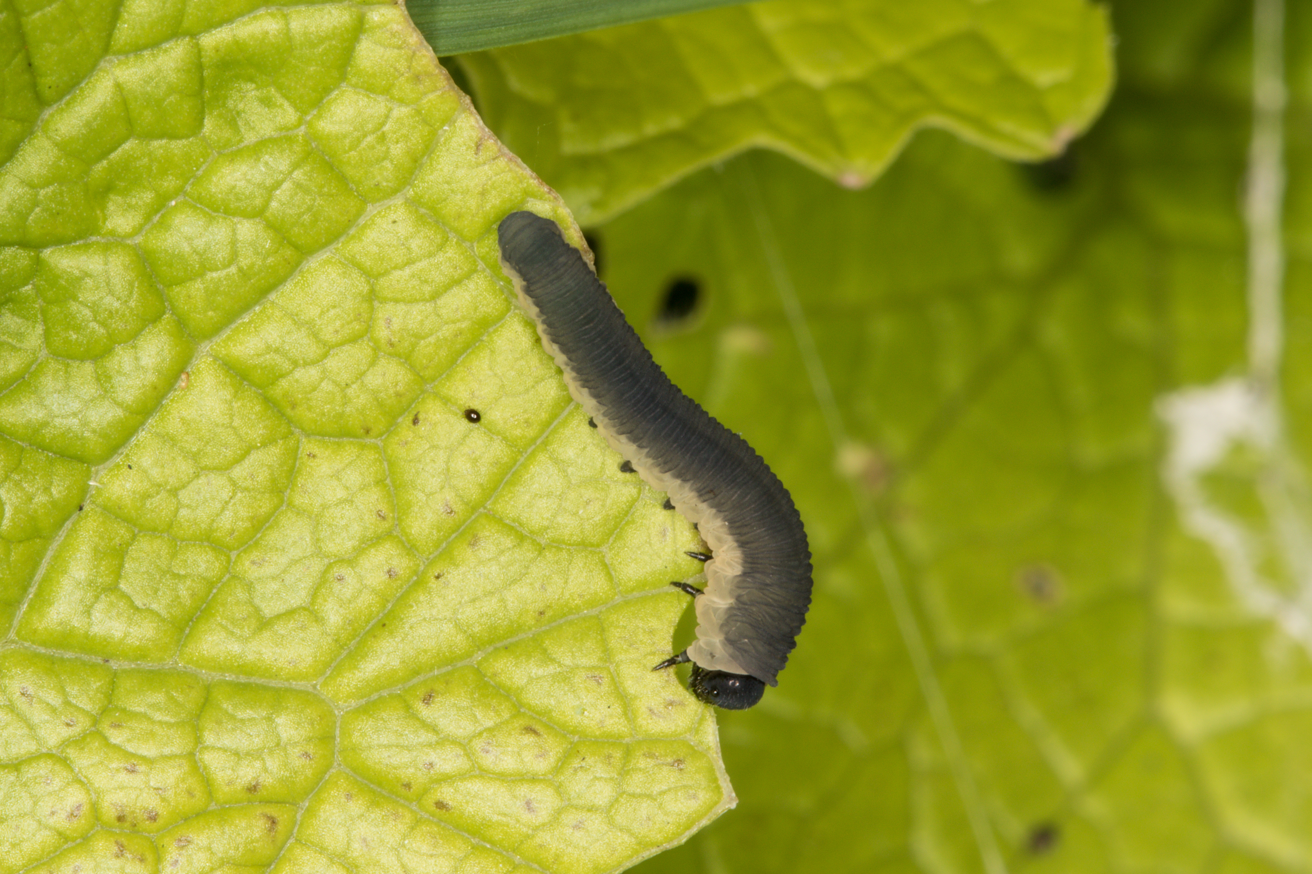 Athalia rosae (Linnaeus, 1758), larva, Søborg, Denmark, 8 August 2015